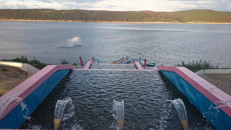 Фонтан в парковой зоне.